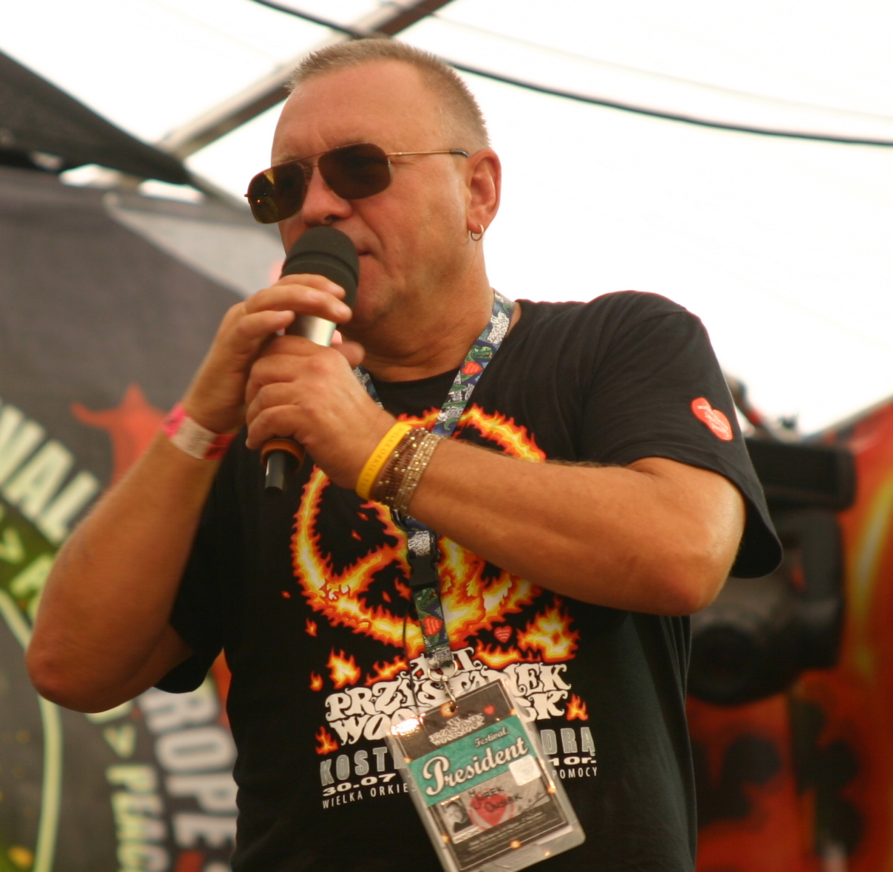 Jerzy Owsiak auf der Haltestelle Woodstock 2010 (Przystanek Woodstock)